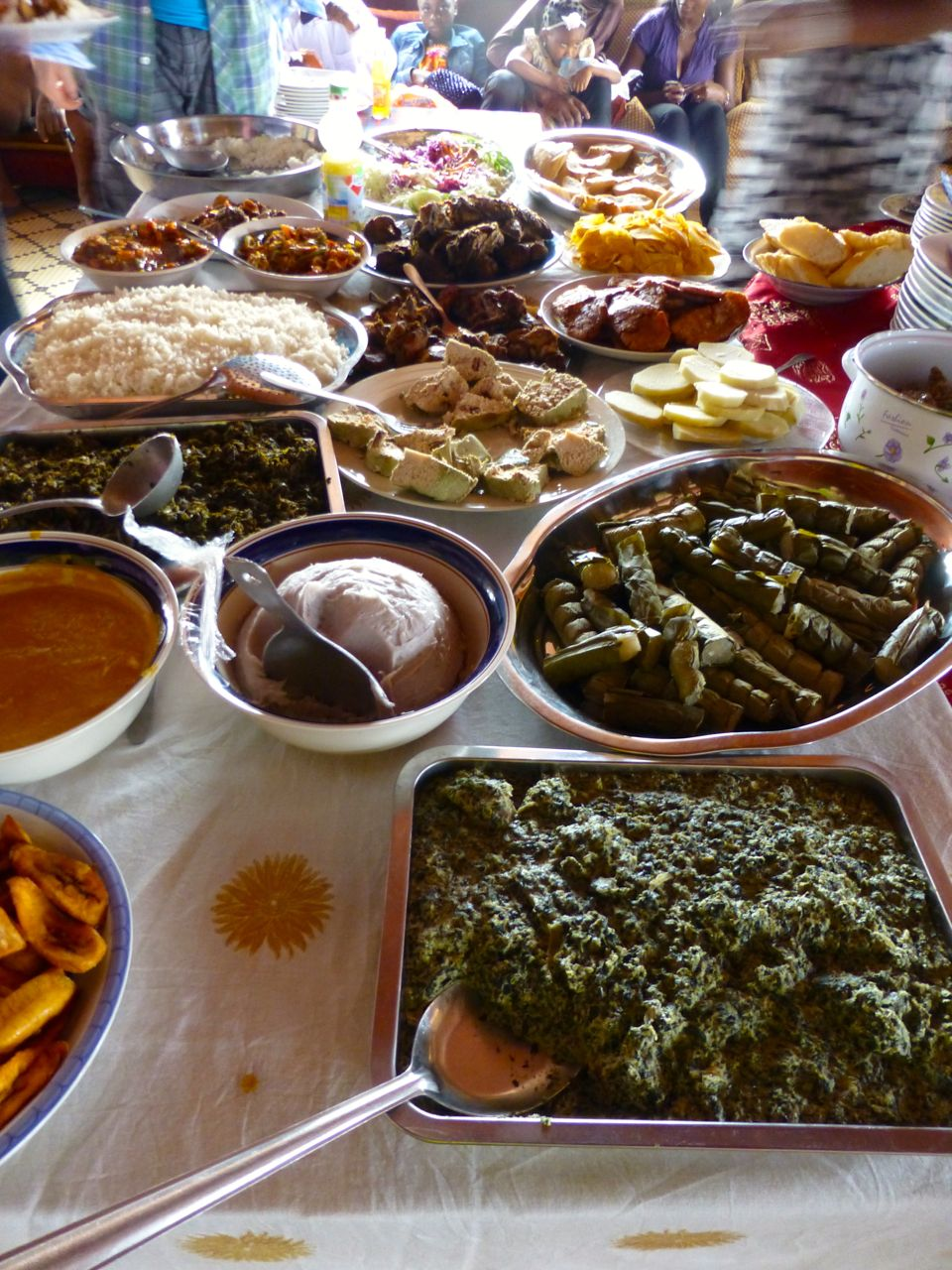 bufffet lors d'une fete